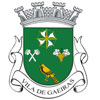 brasão da freguesia de Gaeiras